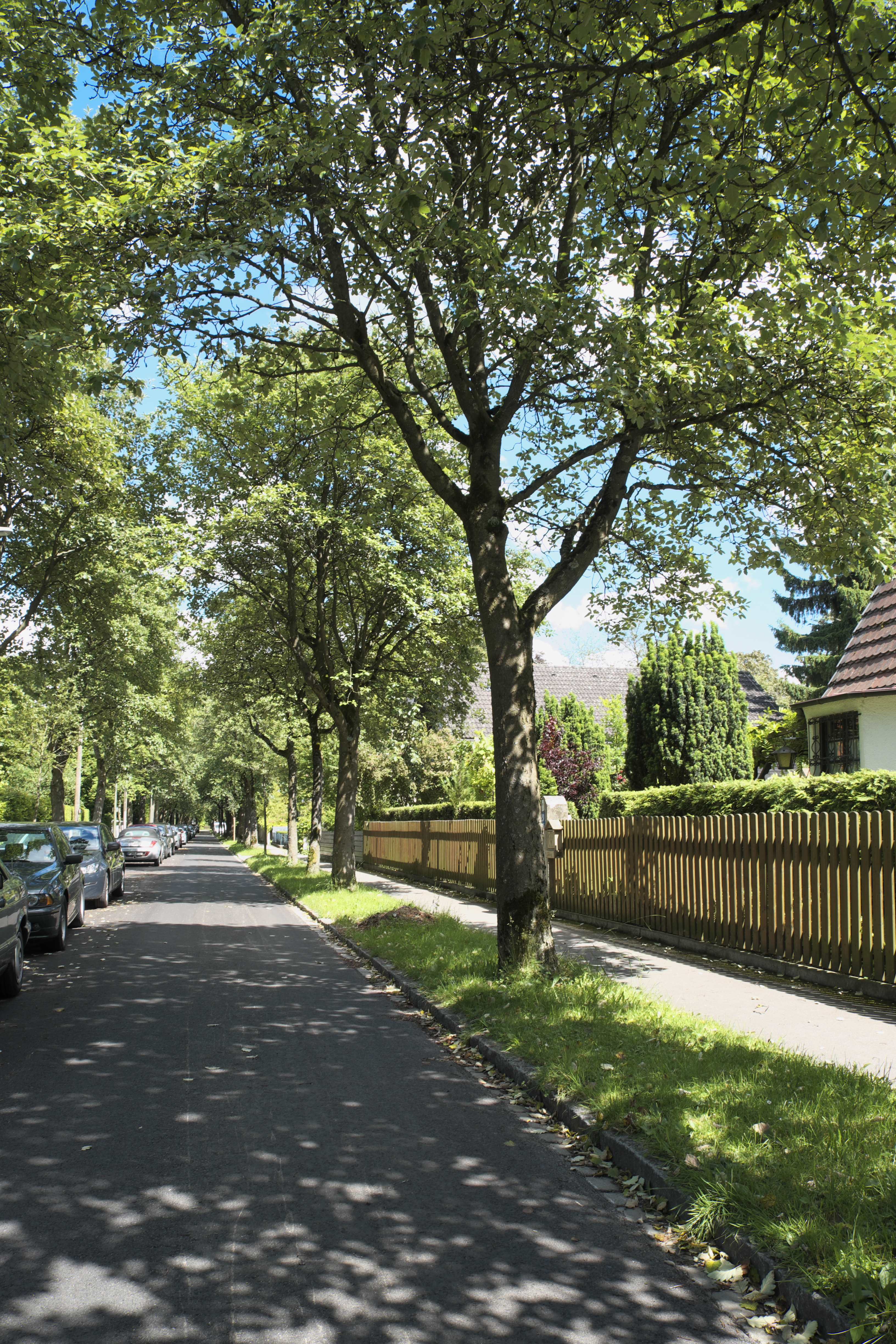 Rubensstraße in Obermenzing im Stadtbezirk Pasing-Obermenzing in München (Bayern/Deutschland)